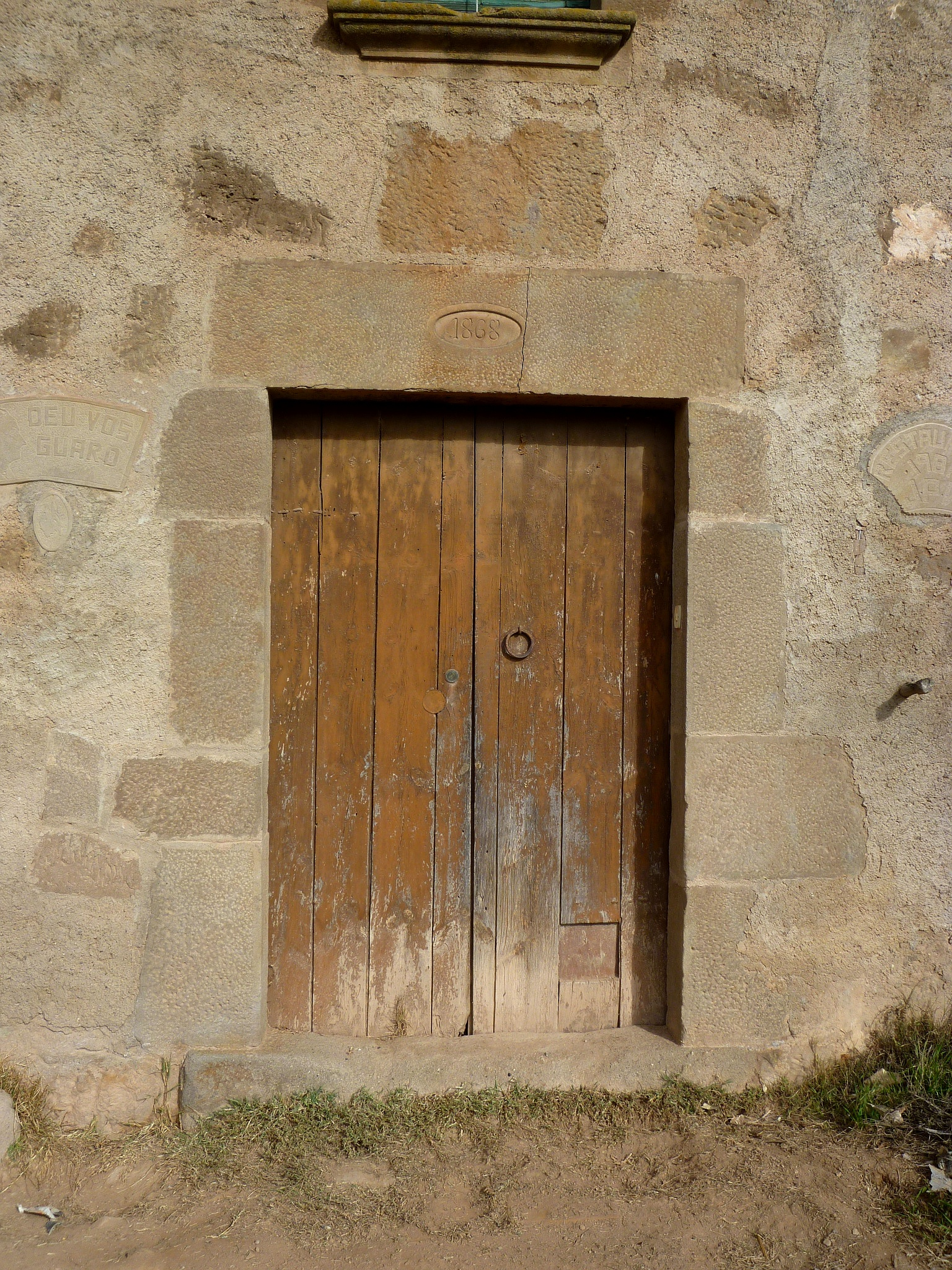 Mas de Miravalls (Biosca): porta d'entrada amb data "1868" a la llinda